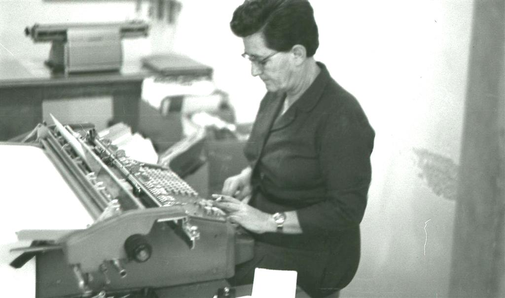 מלכה רופא בעבודתה בהנה"ח בקיבוץ מעוז חיים